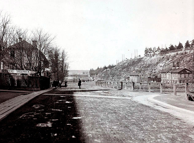 Roslagstull 1902, beskuren bild